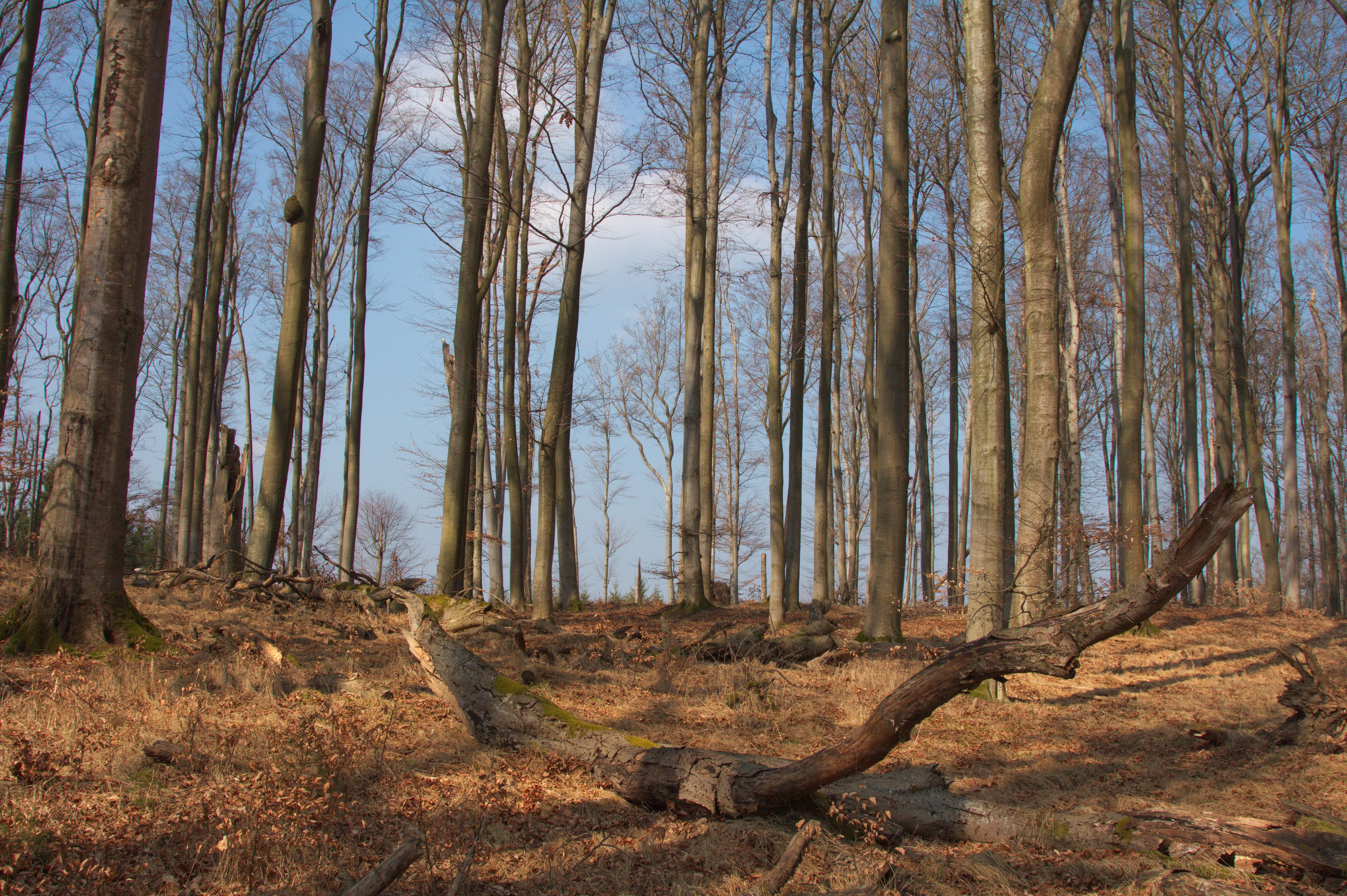 PR Bukové kopce - květnatá bučina